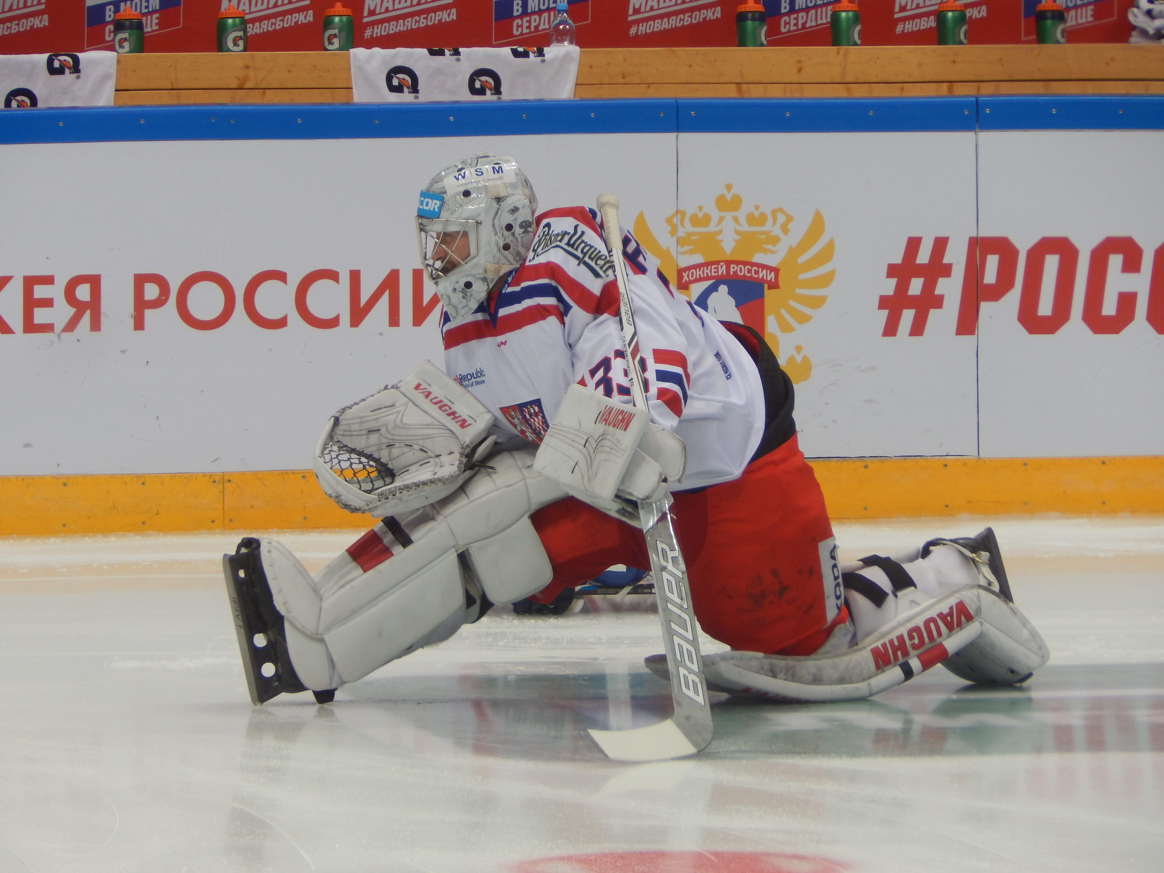 Кубок Первого Канала 2017, матч Чехия - Канада (15 декабря 2017) 33 FRANCOUZ,Pavel